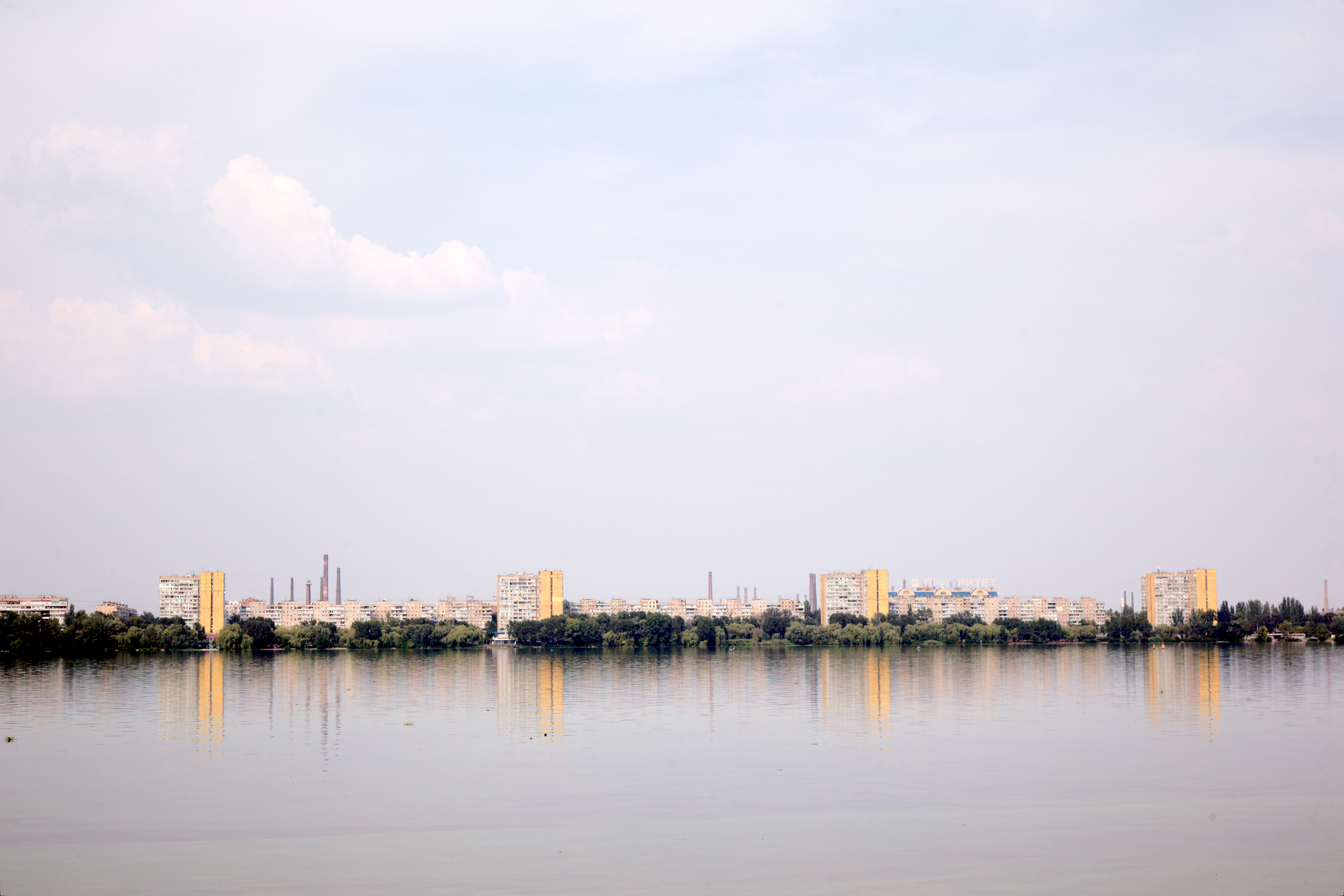 Dnipropetrovsk